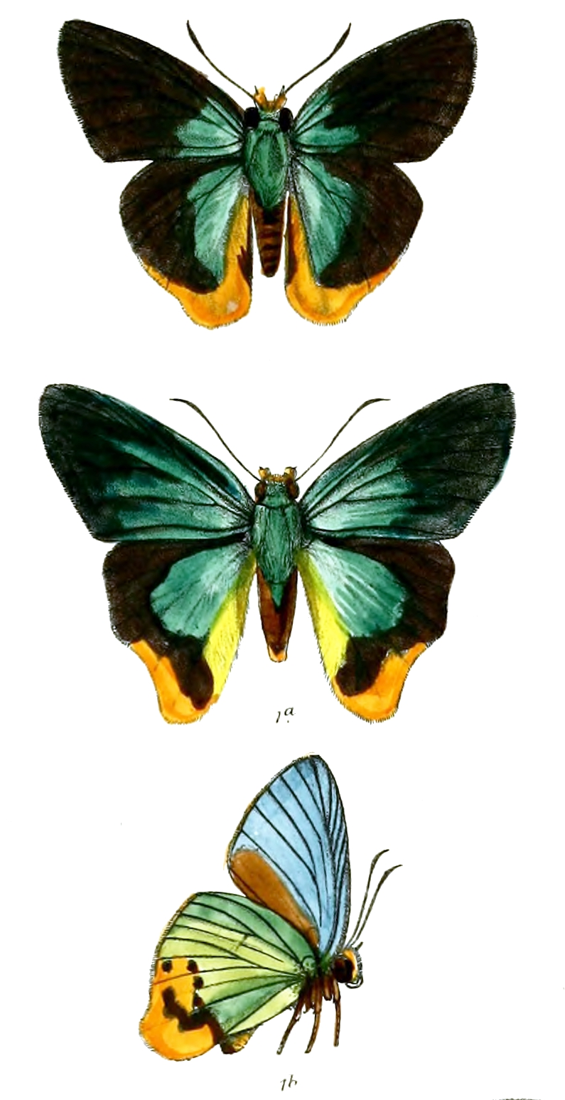 Rhopalocampta crawfurdi = Choaspes subcaudatus (male, female and male underside)